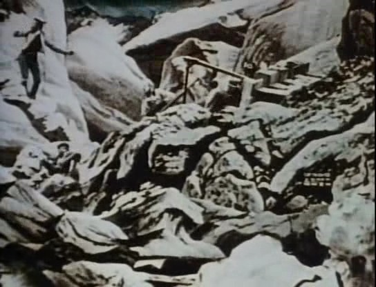 Méliès, Le voyage a travers l'impossible1904 colorizée 14